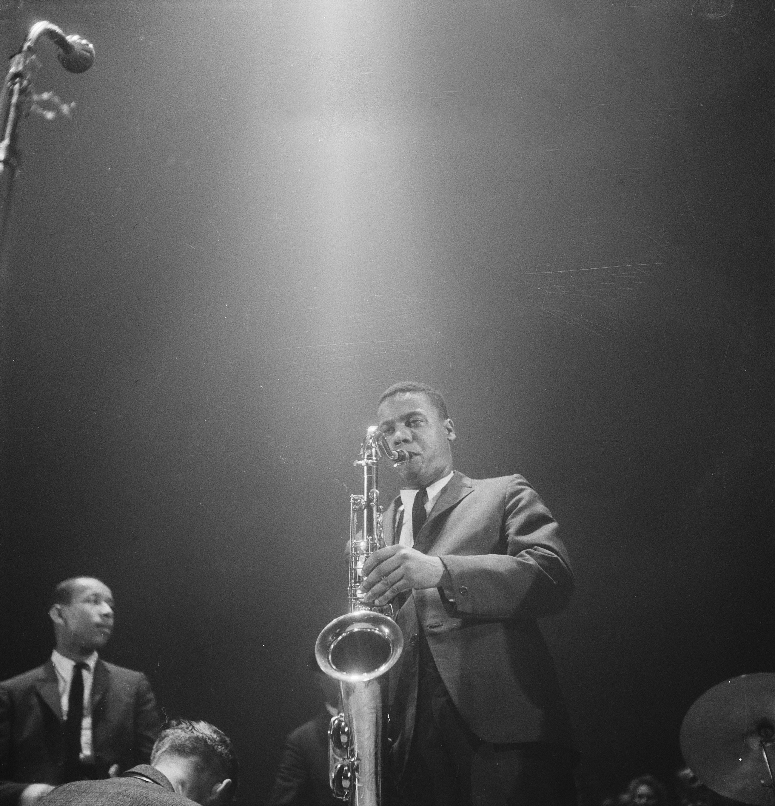 Collectie / Archief : Fotocollectie Anefo Reportage / Serie : [ onbekend ] Beschrijving : Concertgebouw Amsterdam, Art Blakey en Joss Messengers Walter Doois , Lee Morgan Datum : 15 november 1959 Locatie : Amsterdam, Noord-Holland Trefwoorden : CONCERTGEBOUWEN Persoonsnaam : Art Blakey, Doois, Walter, Joss Messengers, Morgan, Lee Fotograaf : Behrens, Herbert / Anefo Auteursrechthebbende : Nationaal Archief Materiaalsoort : Negatief (zwart/wit) Nummer archiefinventaris : bekijk toegang 2.24.01.03 Bestanddeelnummer : 910-8267 Reacties Geplaatst door Jazz liefhebber op 16 mei 2017 - 18:49. Art Blakey en zijn Jazz Messengers: Walter Davis, Wayne Shorter, Lee Morgan en Merritt Tenor-saxofonist Wayne Shorter